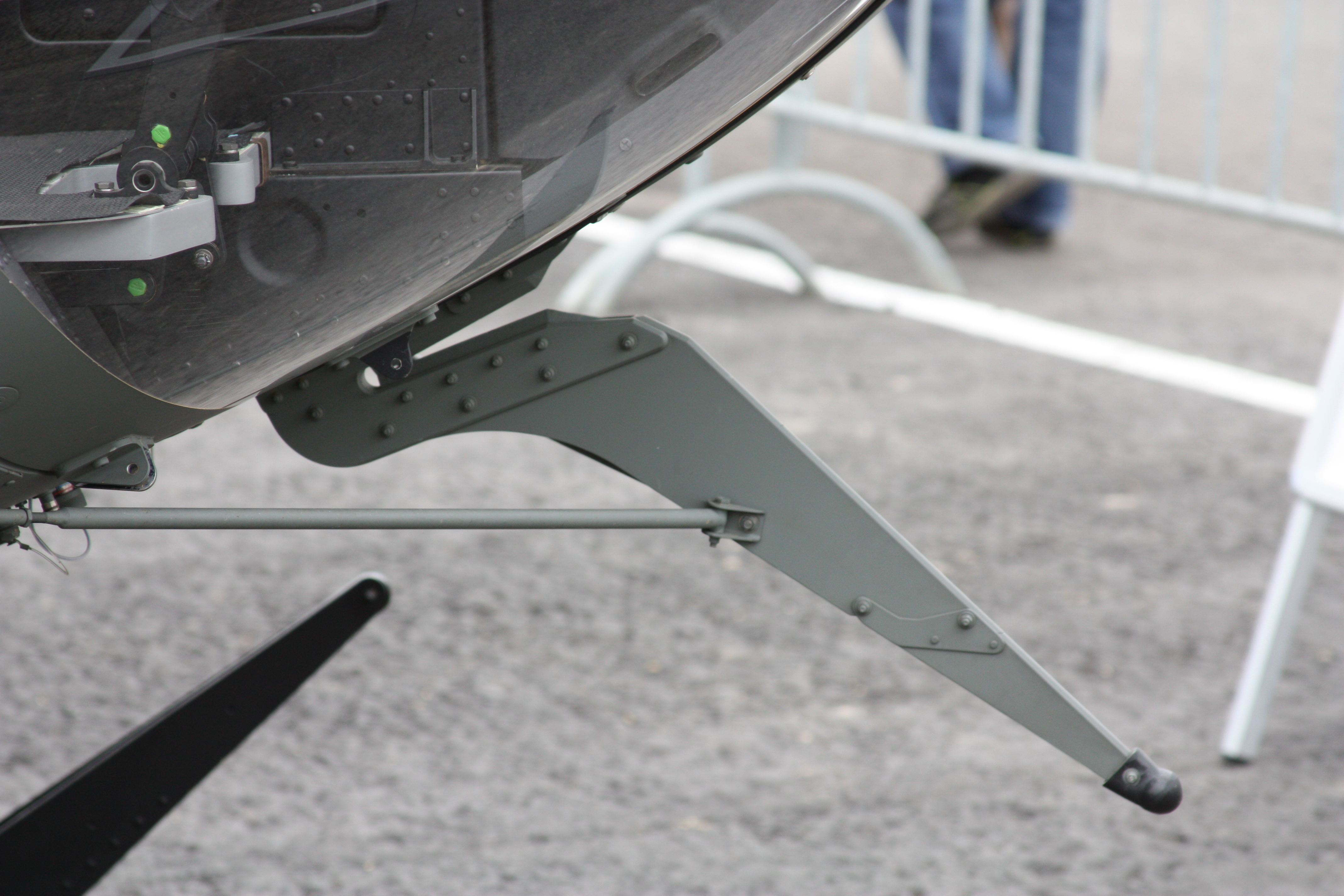 ILA 2010, am Samstag aufgenommen, meist erhöht von einer Leiter fotografiert